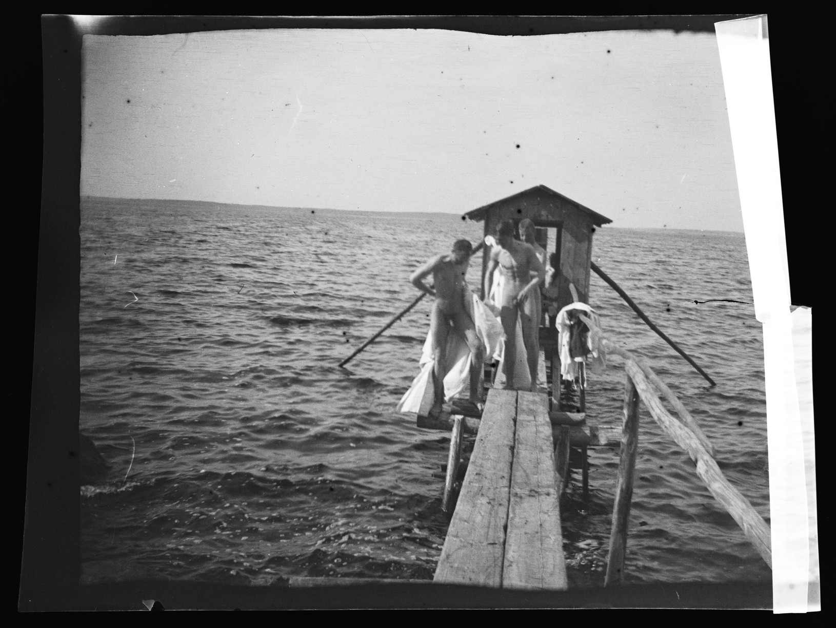 HS Familjeliv 1904 34 valokuvafilmi, selluloosanitraatti, leveys 82 mm, korkeus 55 mm Asiasanat: valokuvat, Simberg, Hugo, taiteilija, Simberg-suku, kesäpaikka, Niemenlautta, Säkkijärvi, uimaseurue, alaston miesryhmä, 4 henkilöä, seisovat(3), istuva(1), saunalaiturilla, Selkäranta, vas. Simberg, Hugo, laituri lankkurakenteinen, pukkiperusta, päässä uimahuone, lautarakenteinen, riukutuet, taustalla meri, selkä, Suomenlahti ; urheilu, liikunta(uinti) Hugo Simbergin jäljillä - Kansallisgalleria, Hugo Simbergin arkisto